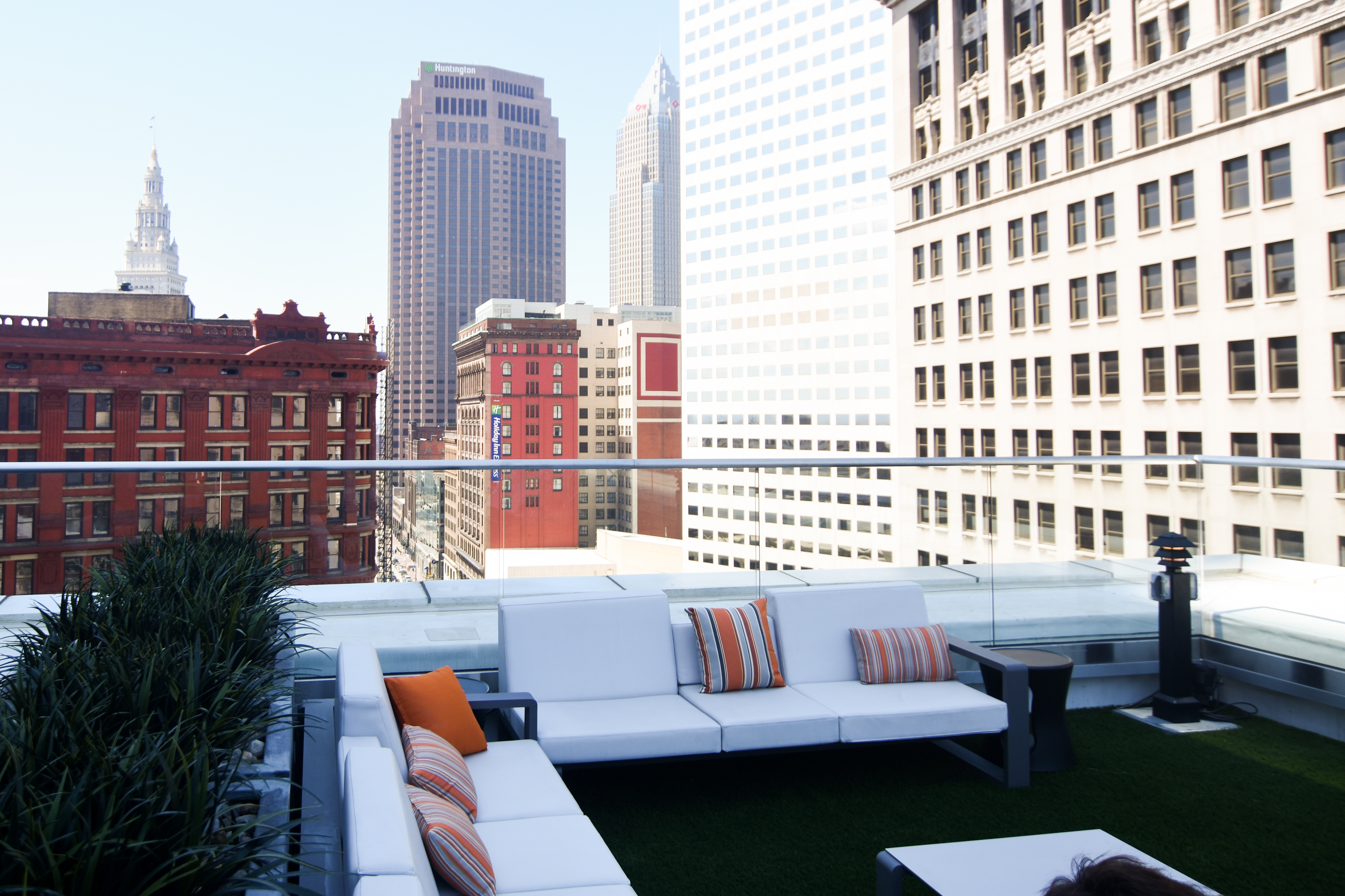 Azure Cleveland